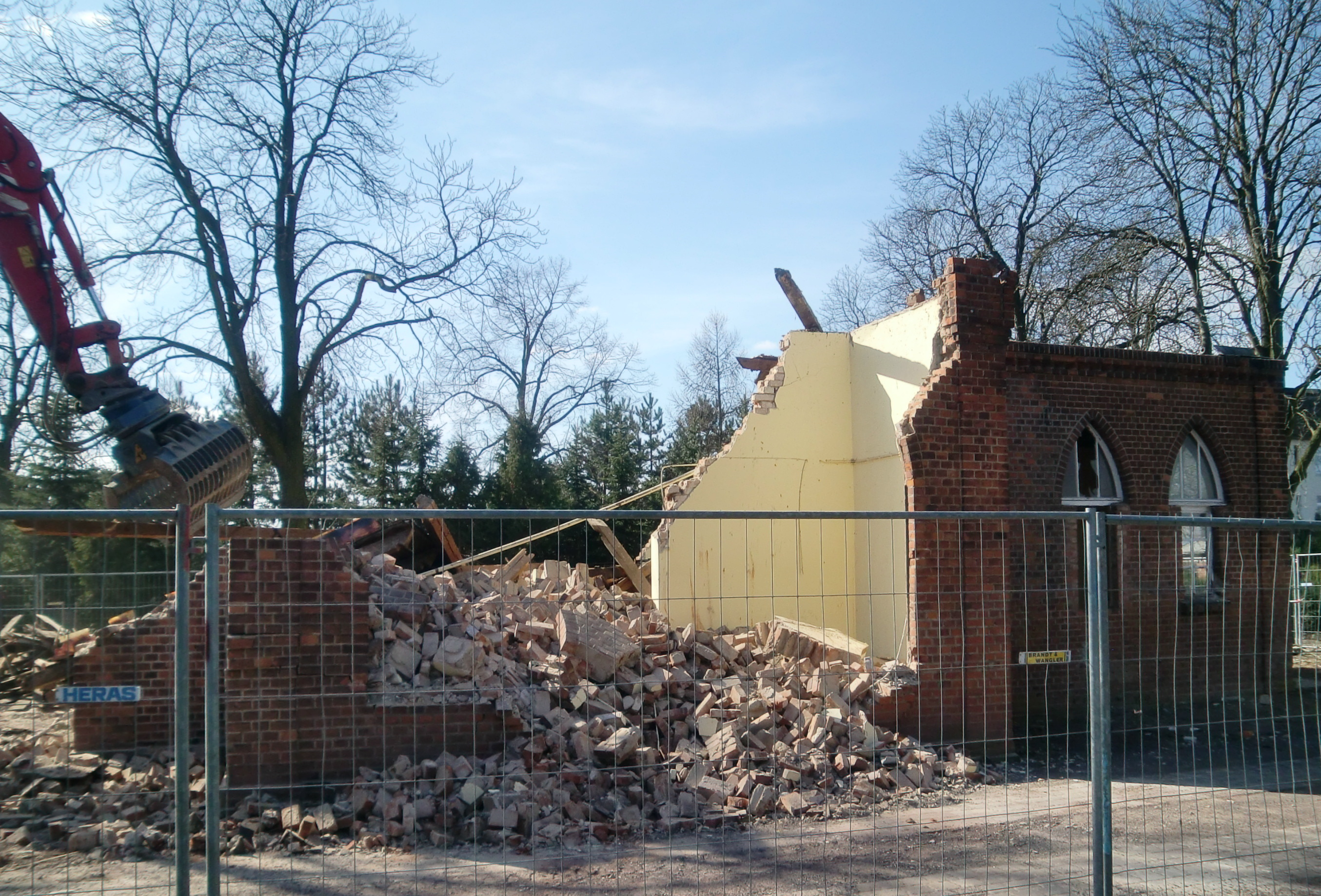 Abriss der Friedhofskapelle Salbke am 20.3.2009